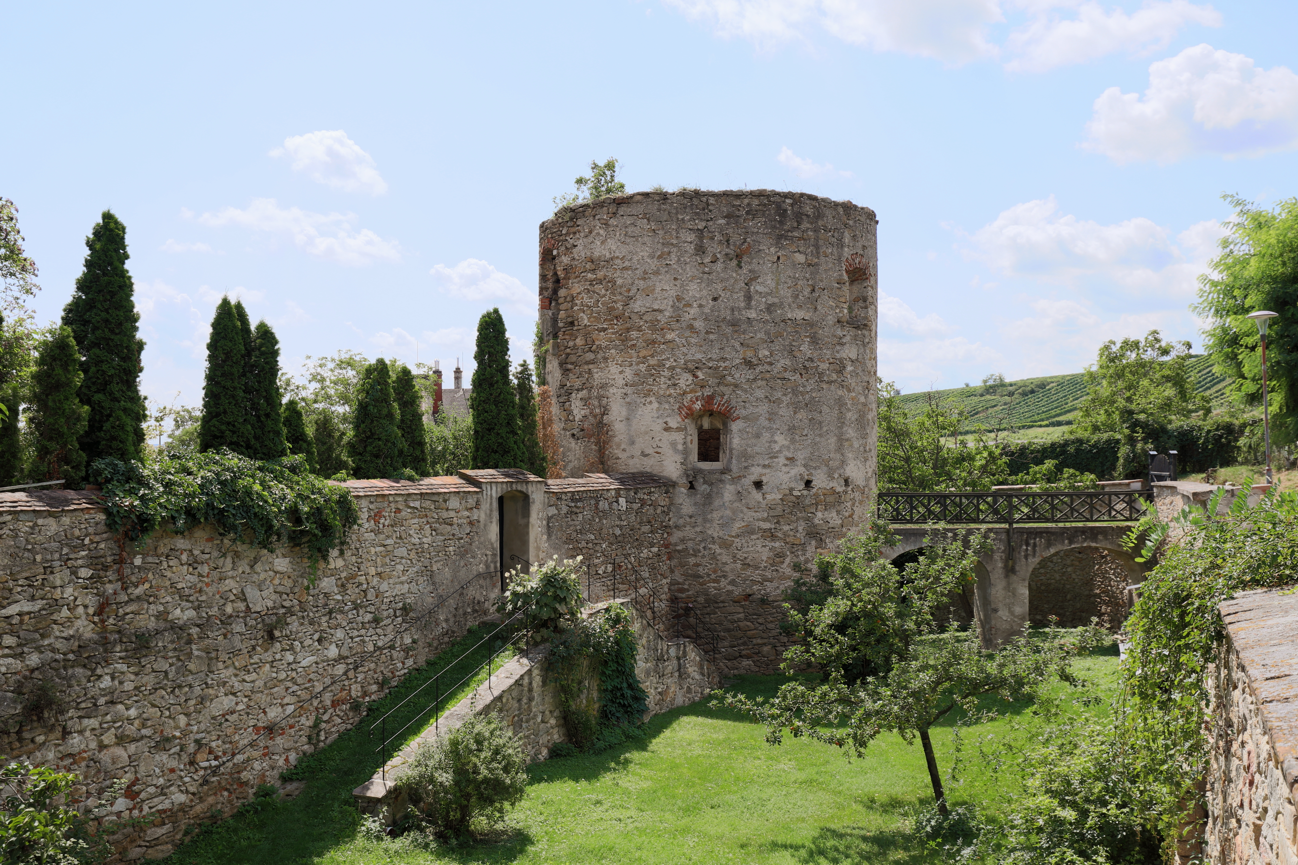 Stadtmauer der niederösterreichischen Stadtgemeinde Retz mit dem Haberfelderturm. Der Rundturm wurde im Zuge der Verstärkung der Stadtbefestigung im 15. Jahrhundert aus Bruchsteinen errichtet.